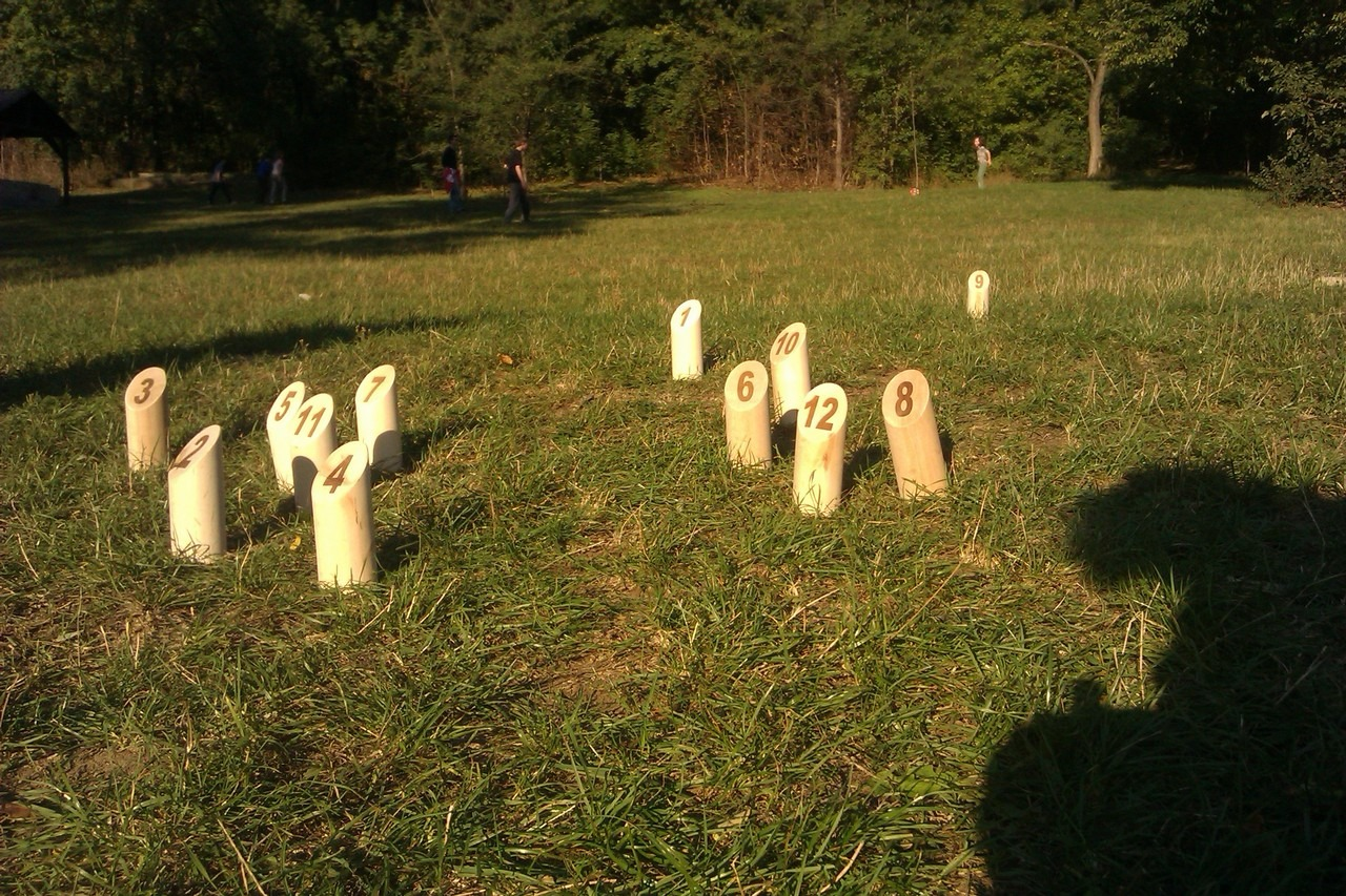 Mölkky bábuk a fűben játék közben, Alcsúti Arborétum, Magyarország